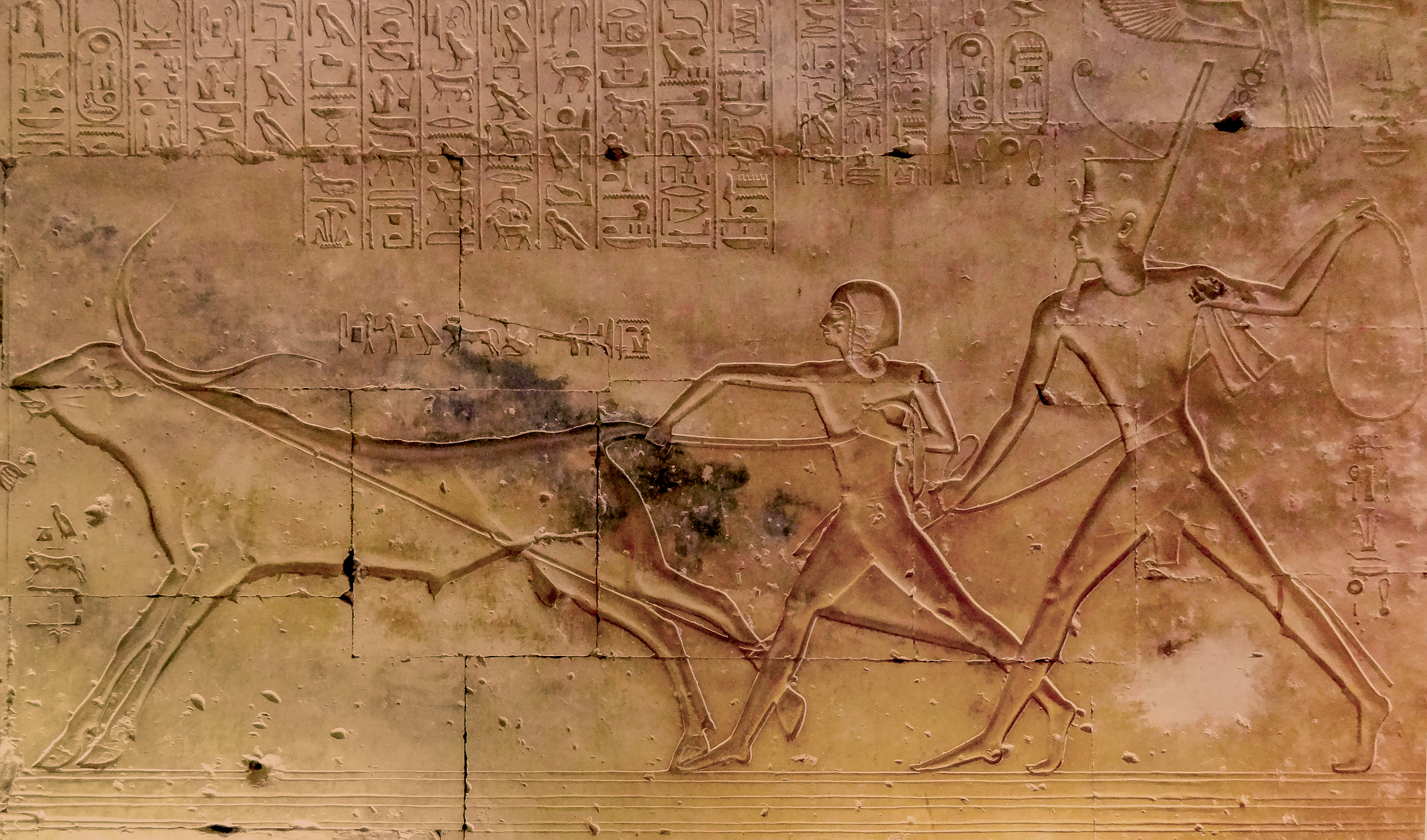 Ramses II. mit seinem Sohn Amun-her-chepesch-ef bei der Wildstierjagd im Totentempel des Sethos I. von Abydos, Ägypten